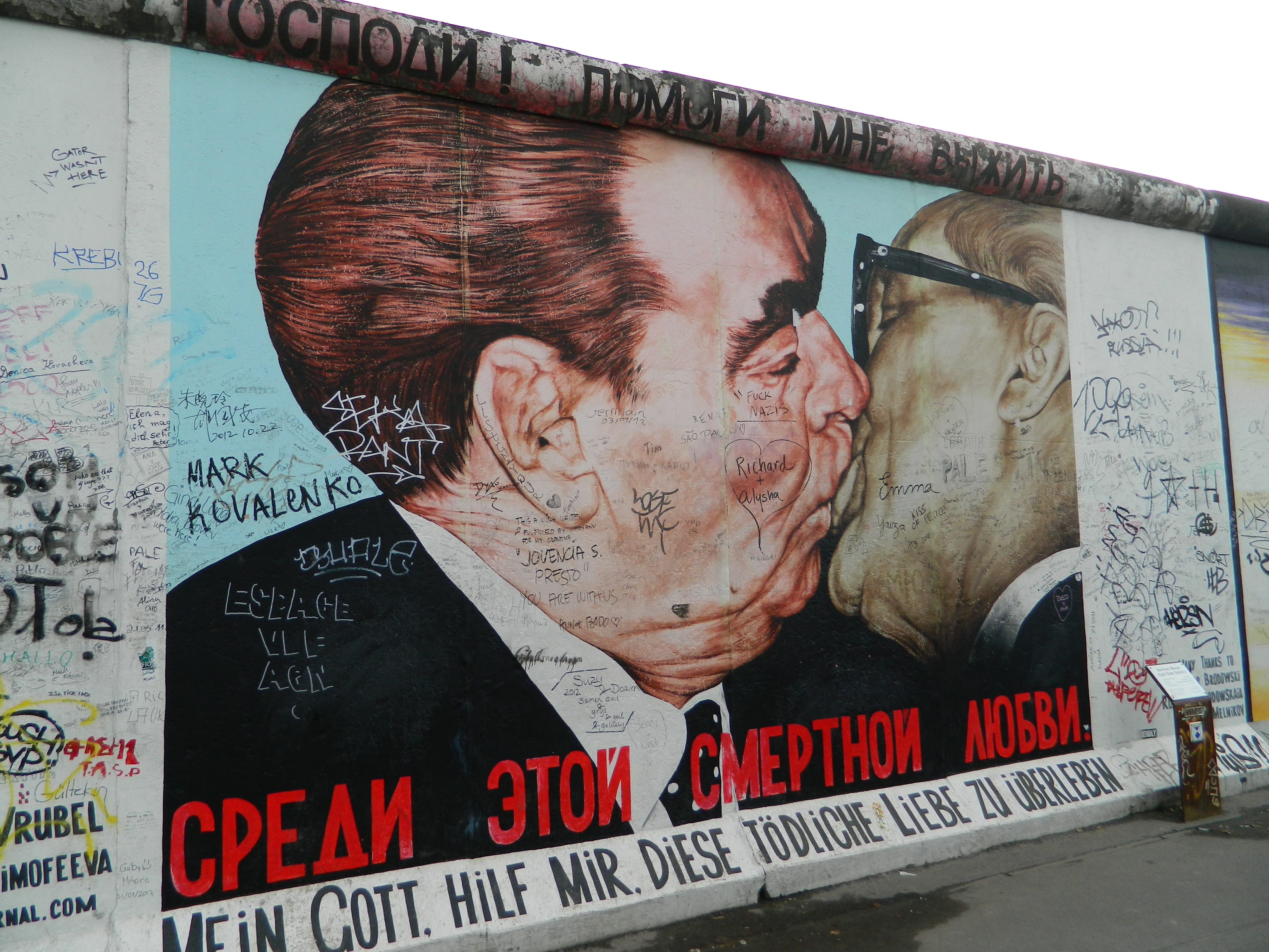 Berlin Wall - East Side Gallery - Dmitri Vladimirovich Vrubel